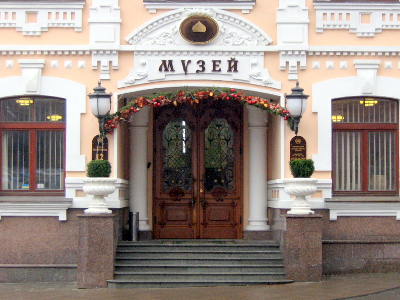 Міський музей "Духовні скарби України"